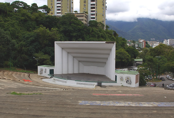 La Concha Acústica de Bello Monte en el año 2013